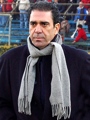 El ex futbolista chileno Eduardo Bonvallet.